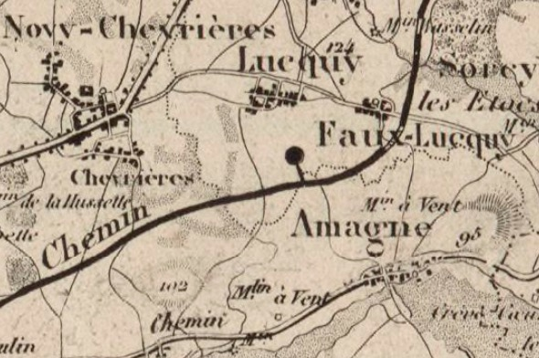 Détail, avec l'emplacement de la ligne de chemin de fer et la station d'Amagne sur une carte du département des Ardennes